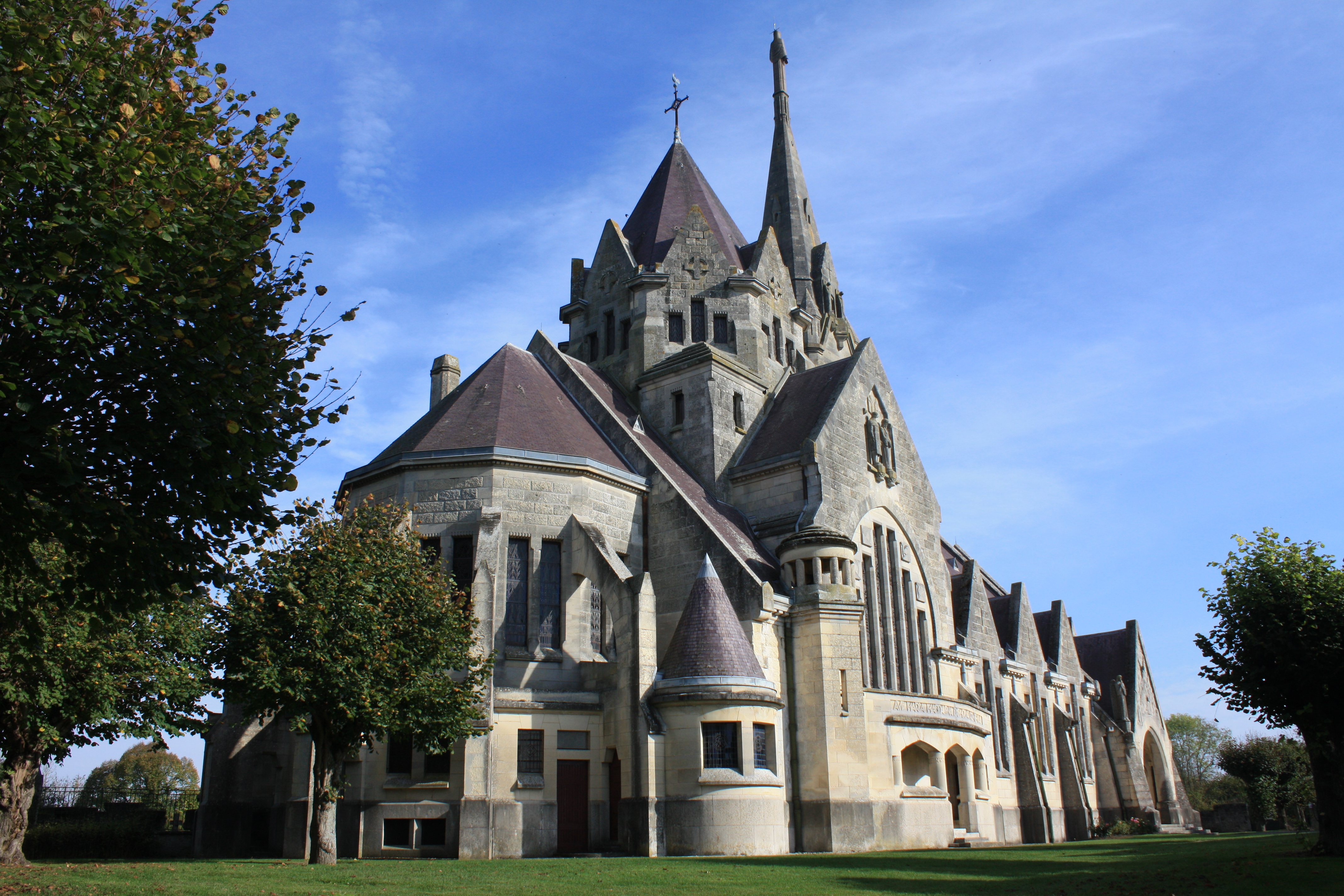 Église Sainte-Marie-Madeleine de Mont-Notre-Dame